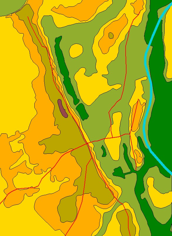 een orohydrografische kaart van oudegem met enkele straten